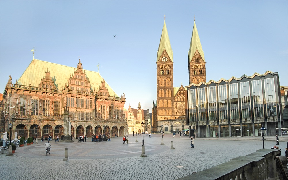 Bremen, Rathaus, Dom und Bürgerschaft